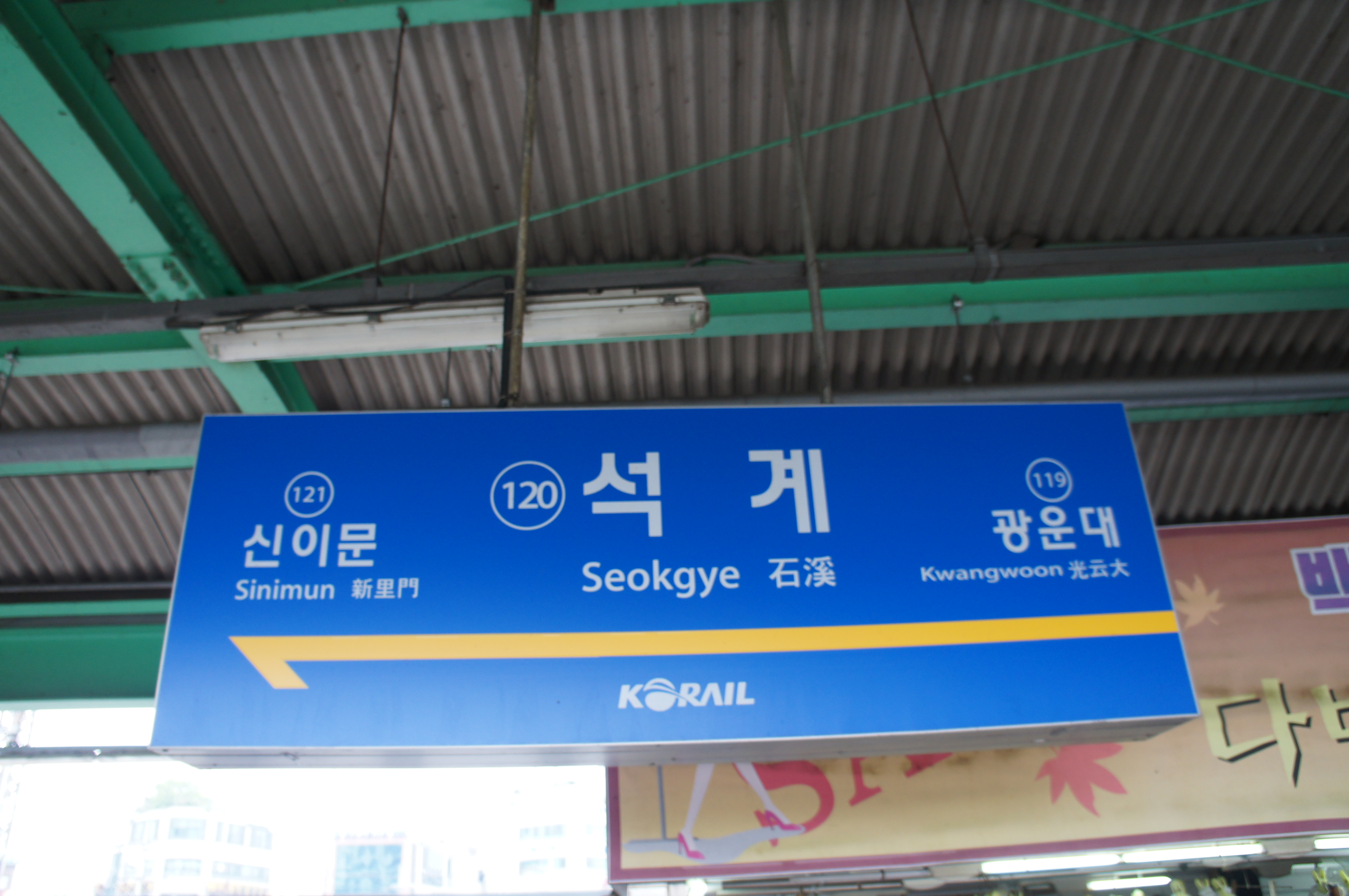 1호선(경원선) 석계역 역명판